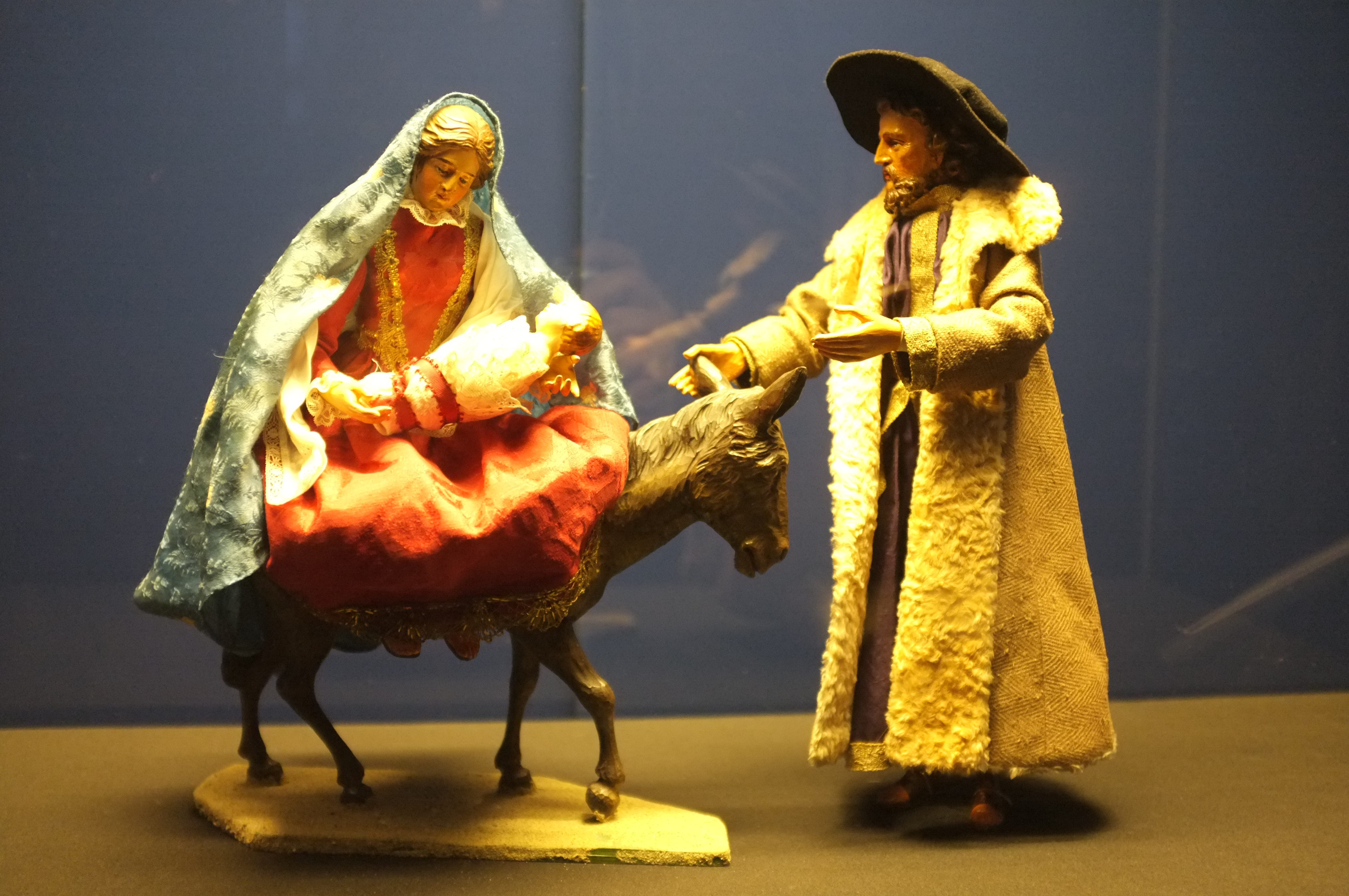 Krippenfiguren im Ingolstädter Münster